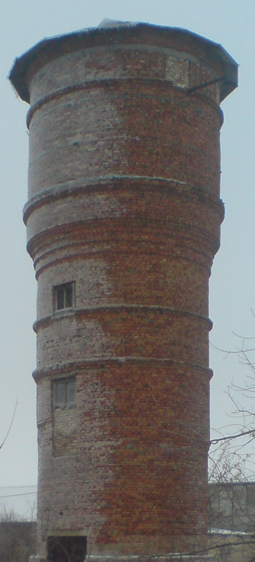 Башта Затишшя